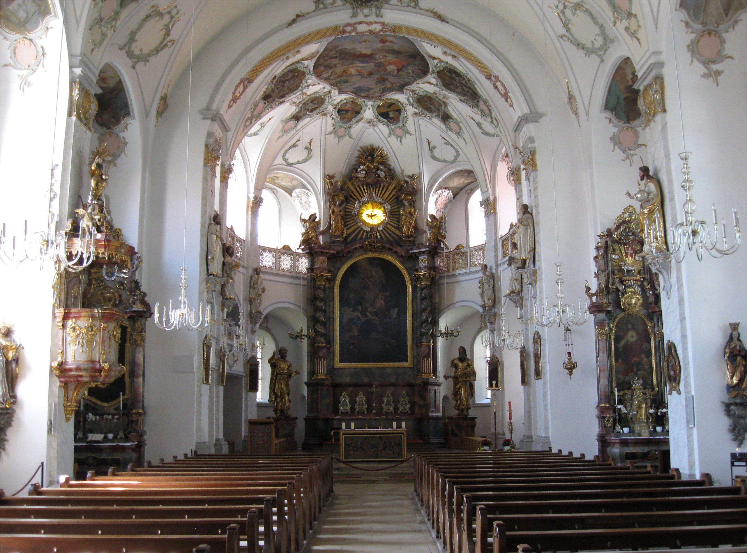 Kath. Stadtpfarrkirche St.Magdalena, Fürstenfeldbruck; barocker Wandpfeilerbau, Constantin Pader zugeschrieben, 1673. Innenraum